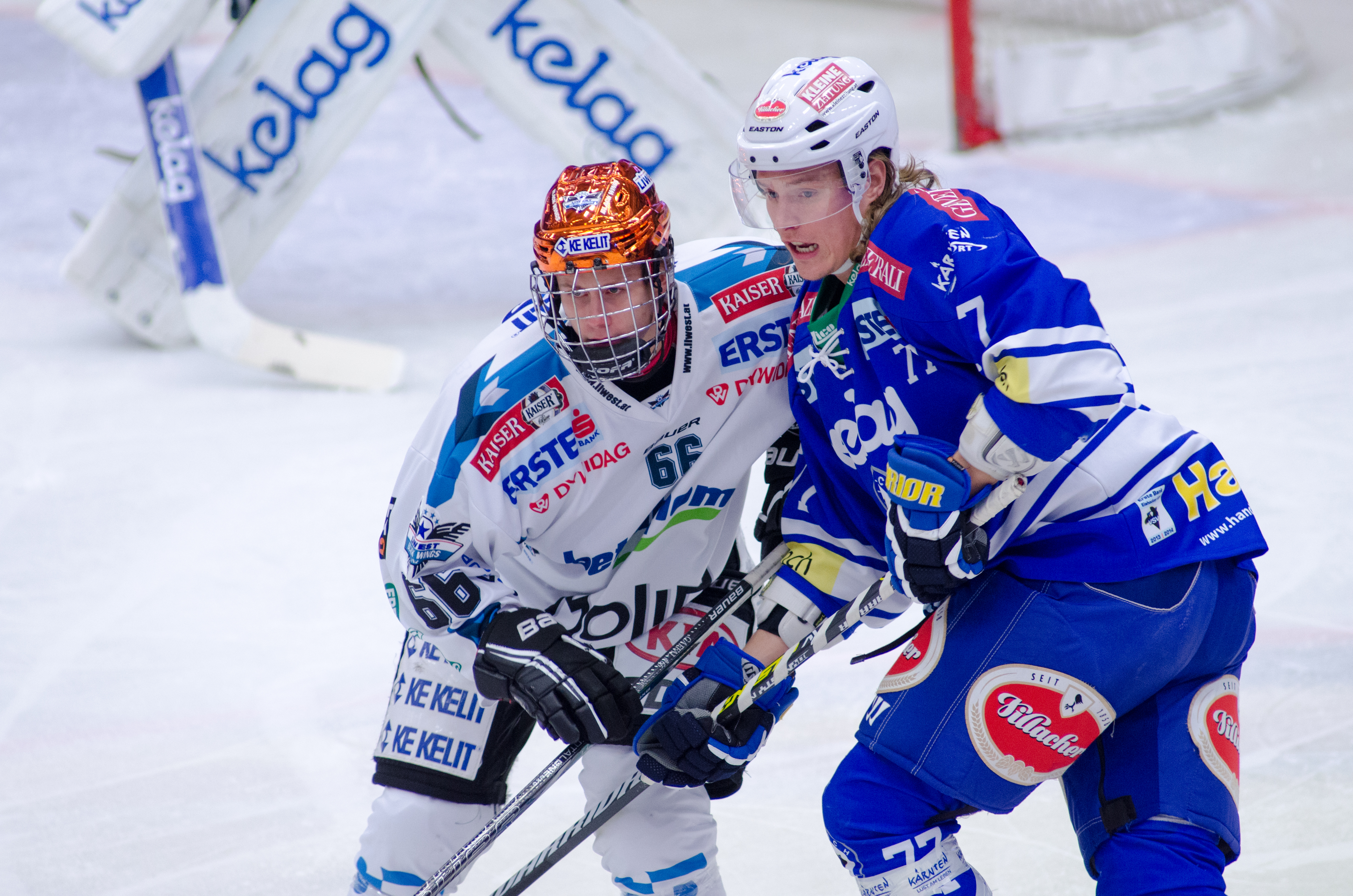 24.11.2013,Stadthalle Villach, AUT, EBEL, 40. Runde, EC VSV vs. EHC Liwest Black Wings Linz, im Bild // frostworx Pictures © 2013, PhotoCredit: frostworx / Alex Micheu